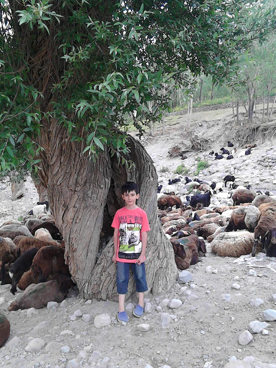 لیقوان